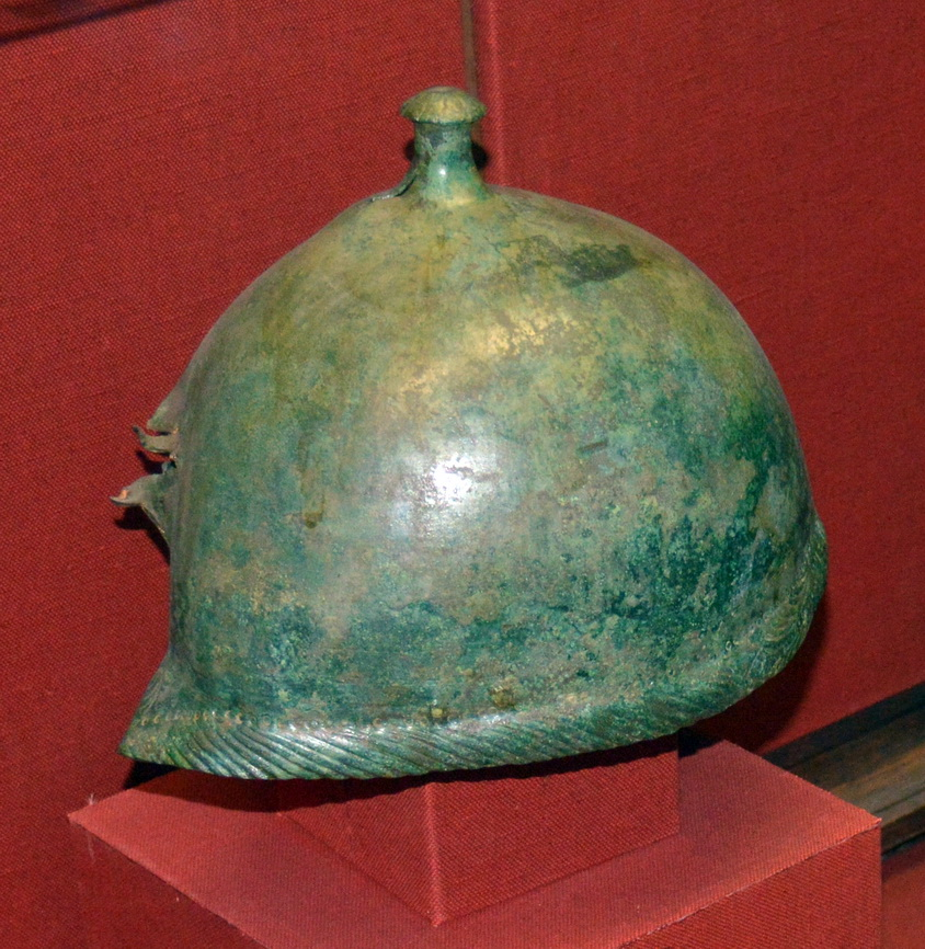 Шлем. Антиповка, случайная находка. Сарматы северного Причерноморья, 2 в. до н.э. - 2 в. н.э.. Бронза.